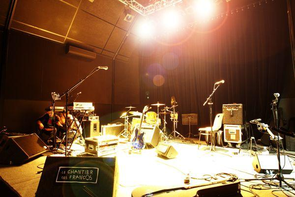 La scène du Chantier des Francos